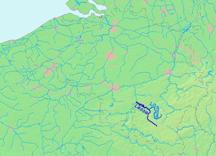 Kaart van de Lesse op basis van Wikimedia Commons kaart MapBelgiumWater